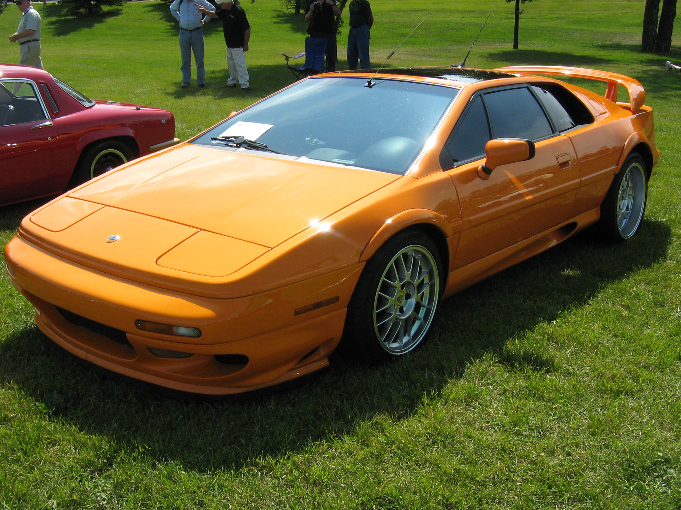 Lotus Esprit V8